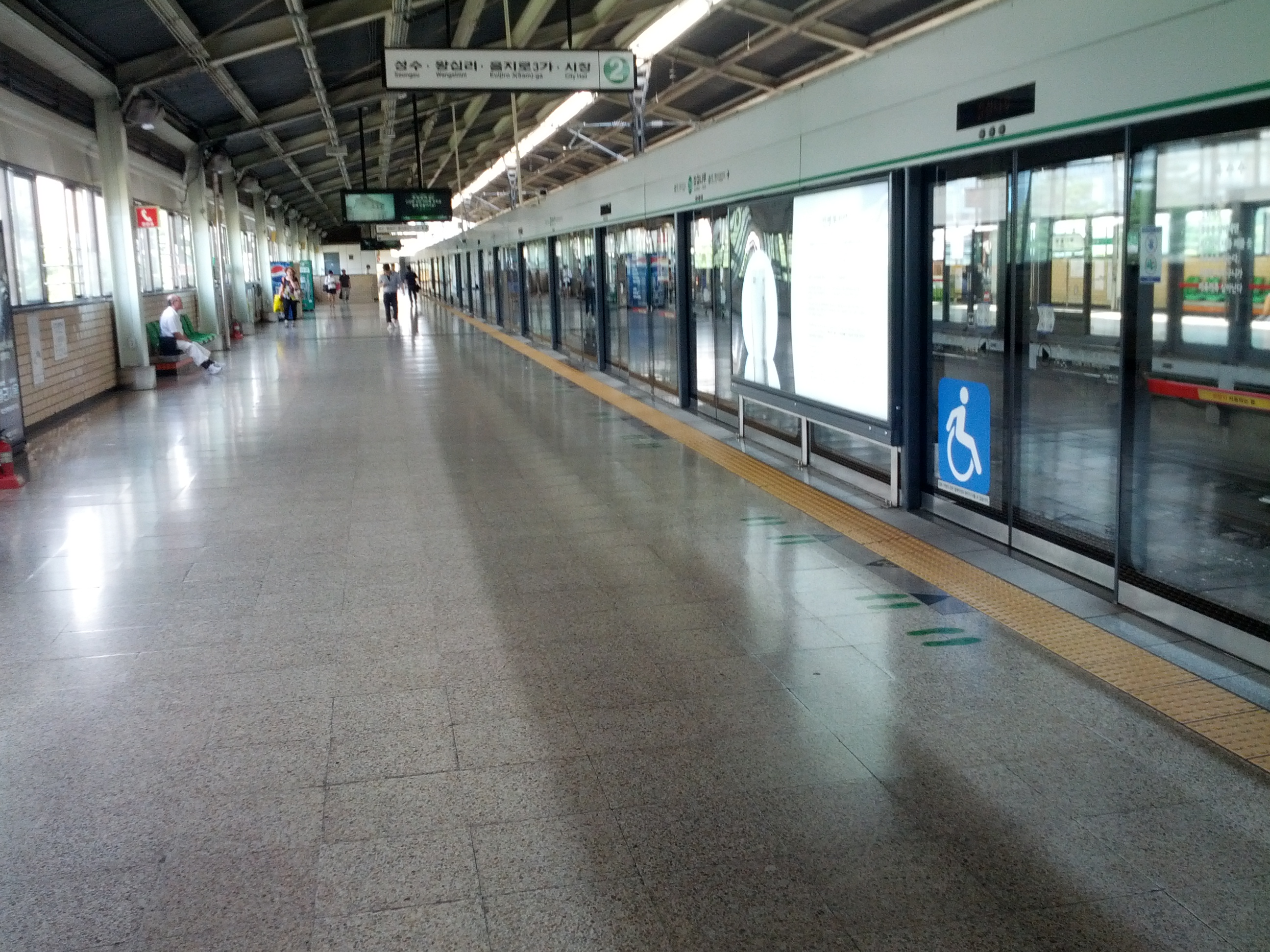 잠실나루역 승강장